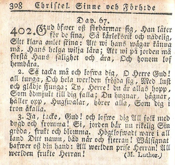 Gud över oss förbarmar sig ur ett exemplar av 1819 års psalmbok, tryckt 1819.